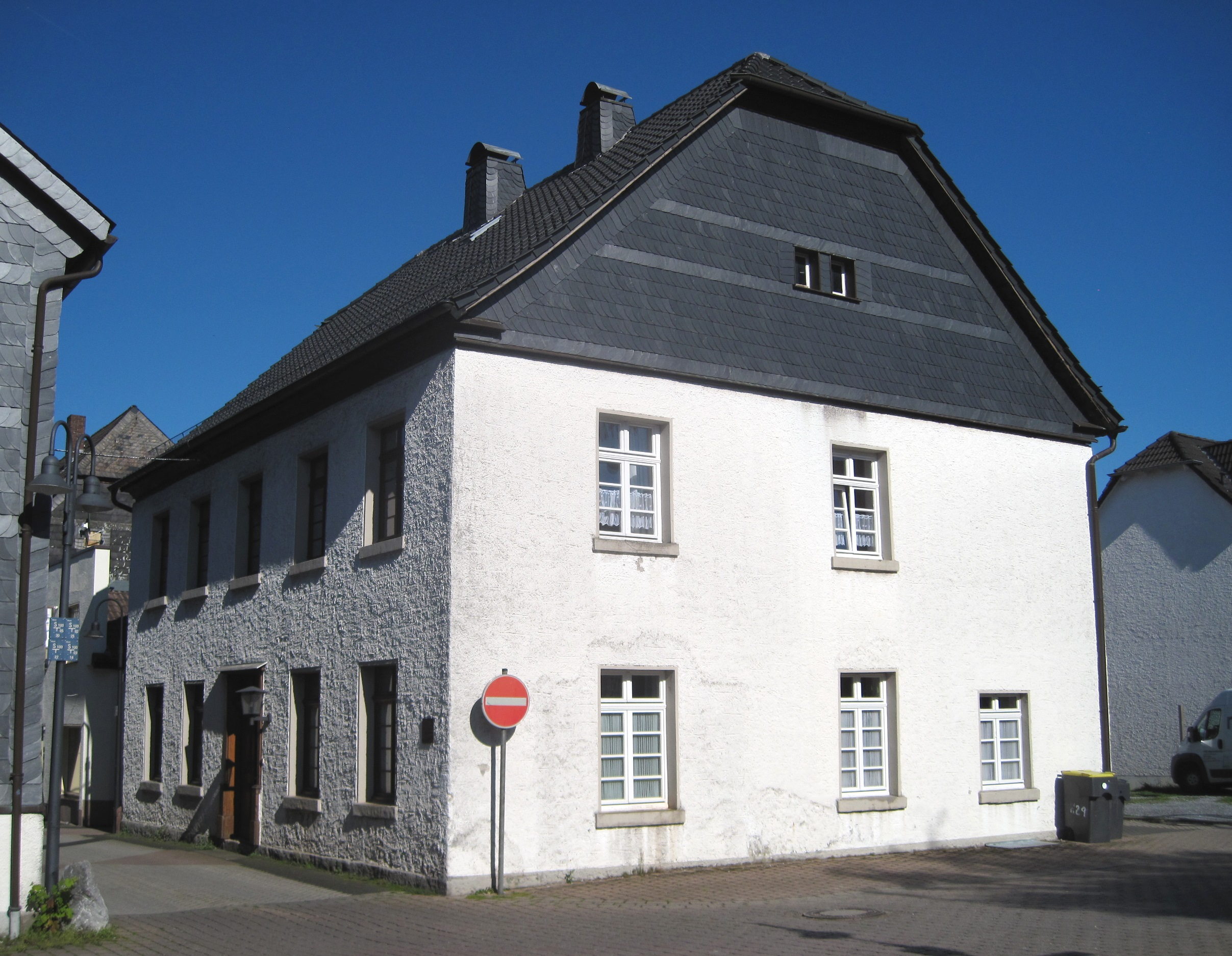 Wohn- und Geschäftshaus in Balve, Alte Gerichtsstraße 9. Gerichtsgebäude von 1832 bis 1884. Tafel am Gebäude: „Altes Gericht. Als Wohnhaus 1808 erbaut, wurde es 1832 umgebaut und als Gerichtsgebäude genutzt. Daher trägt diese Straße den Namen Alte Gerichtsstraße. Die Arresteinrichtungen sind im Haus erhalten. 1884 zog die Gerichtsverwaltung in das neue Amtsgerichtshaus an der Hönnetalstraße.“ This image shows a heritage building in Germany, located in the North Rhine-Westphalian city Balve (no. 5).